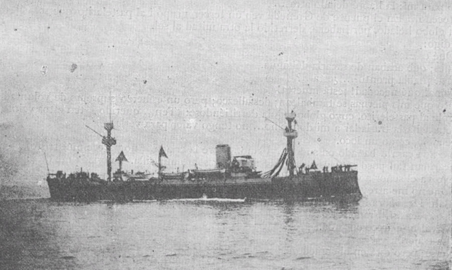 Crucero de la Armada de Chile "Presidente Errázuriz". En servicio desde 1890 hasta 1930.